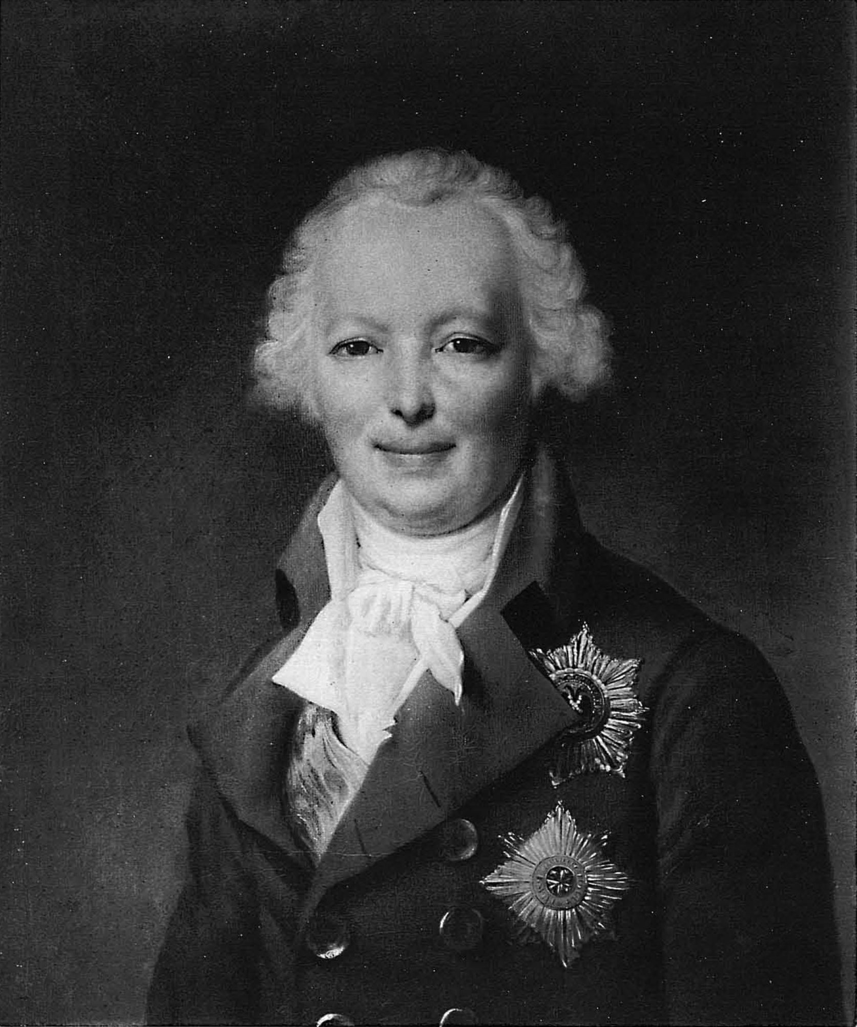 Граф Аркадий Иванович Морков (1747-1827)